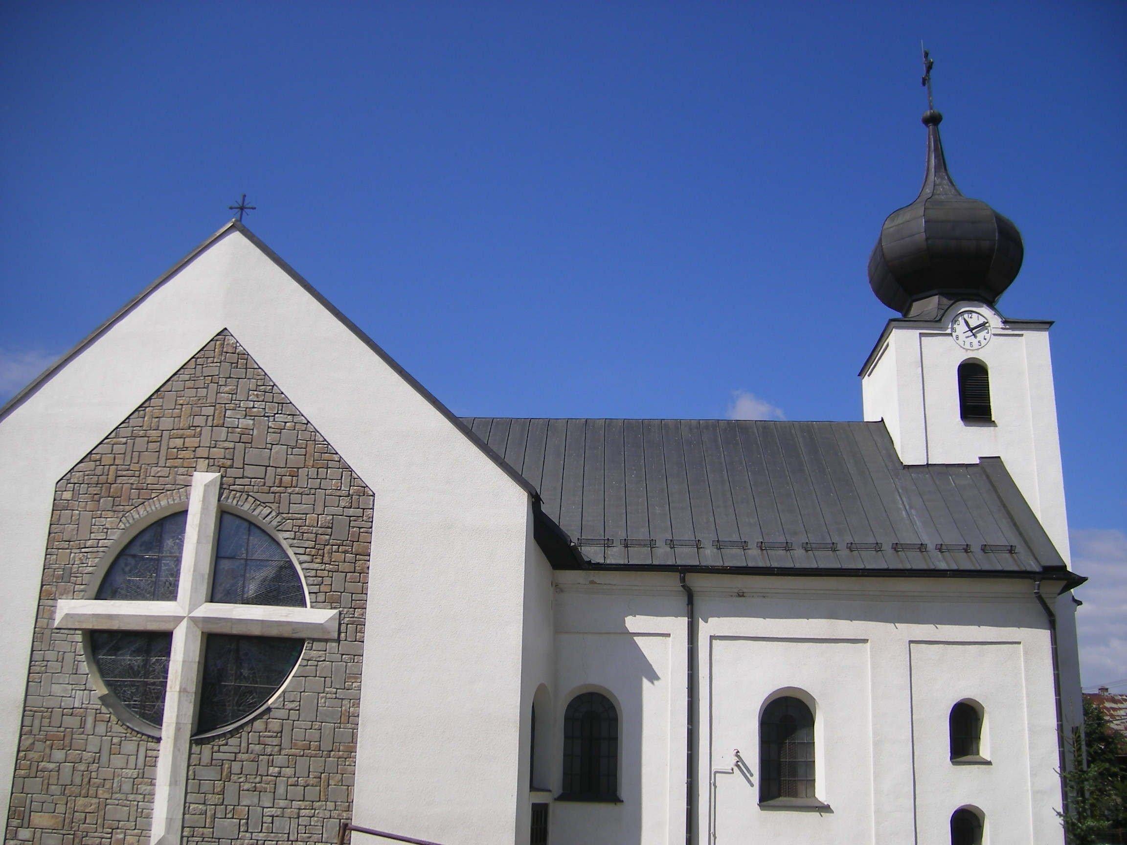 Suchá Hora (okres Tvrdošín)